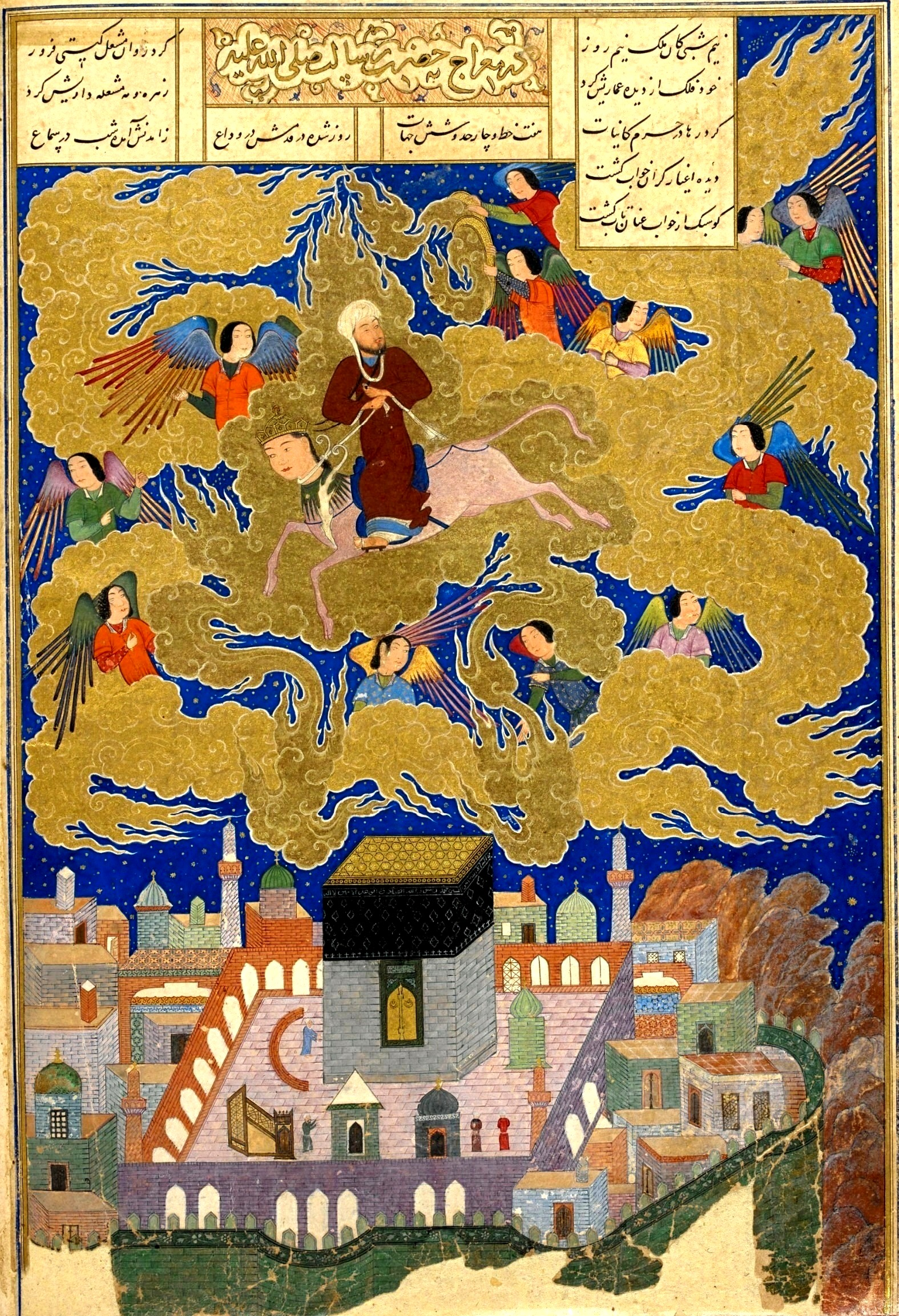 Abd al-Razzak Абд ал-Раззак. Мирадж. Хамсе Низами. 1494